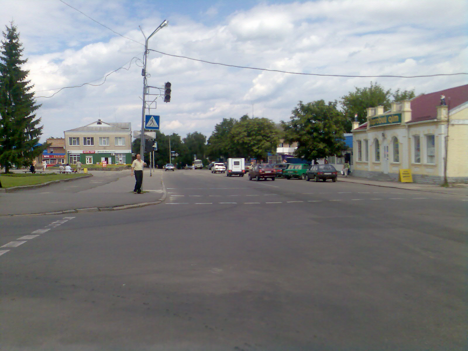 Вулиця Леніна (Корсунь-Шевченківський)